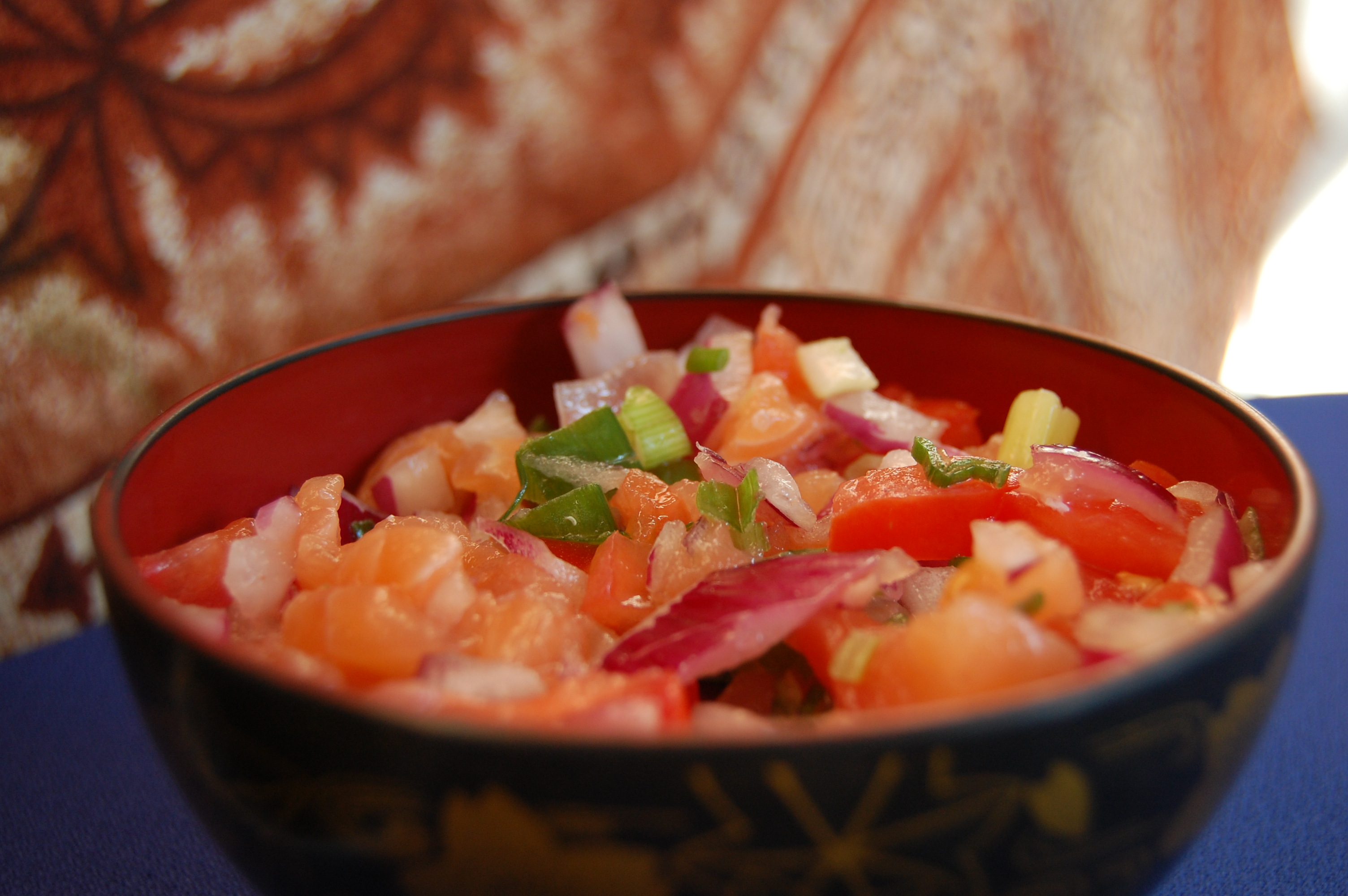 lomi lomi salmon